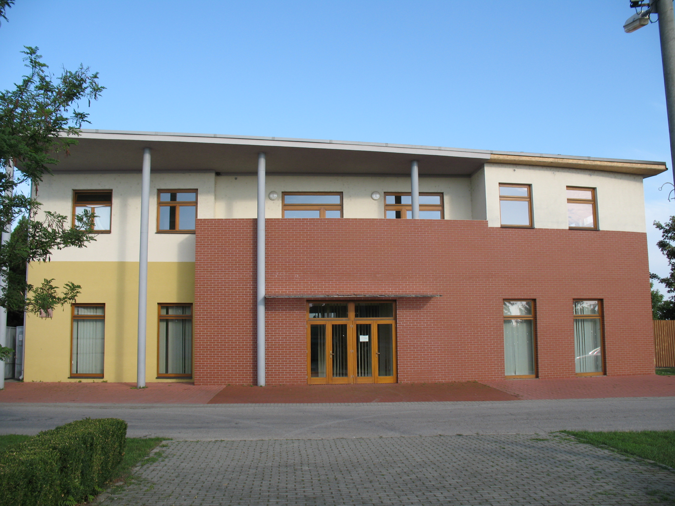 Deáki felújitott kultúrháza